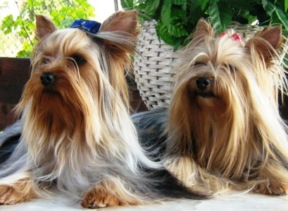 Йоркширски териер